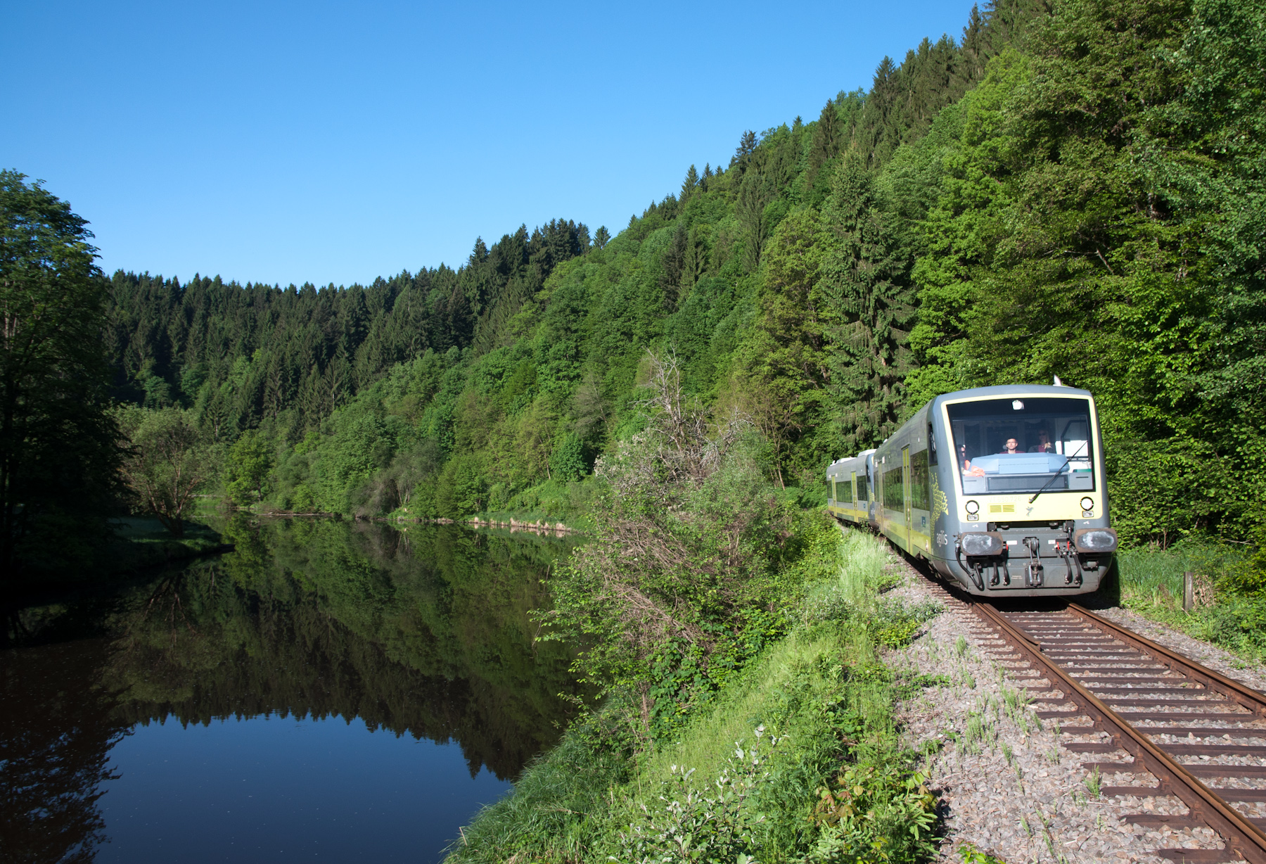 Agilis-Regioshuttle im Einsatz auf der Ilztalbahn bei Fischhaus